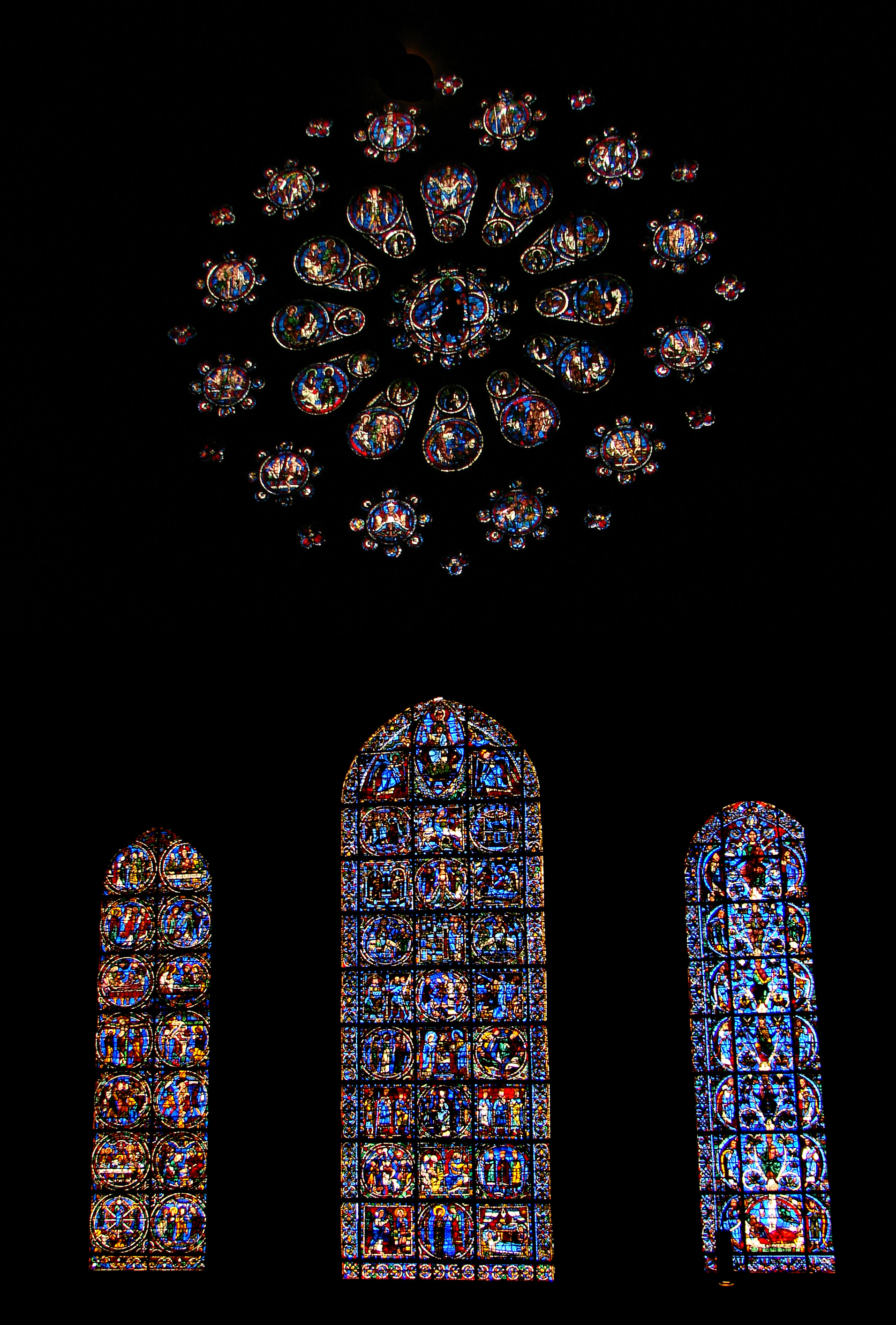 Rose et verrières de la façade de la cathédrale Notre-Dame de Chartres.